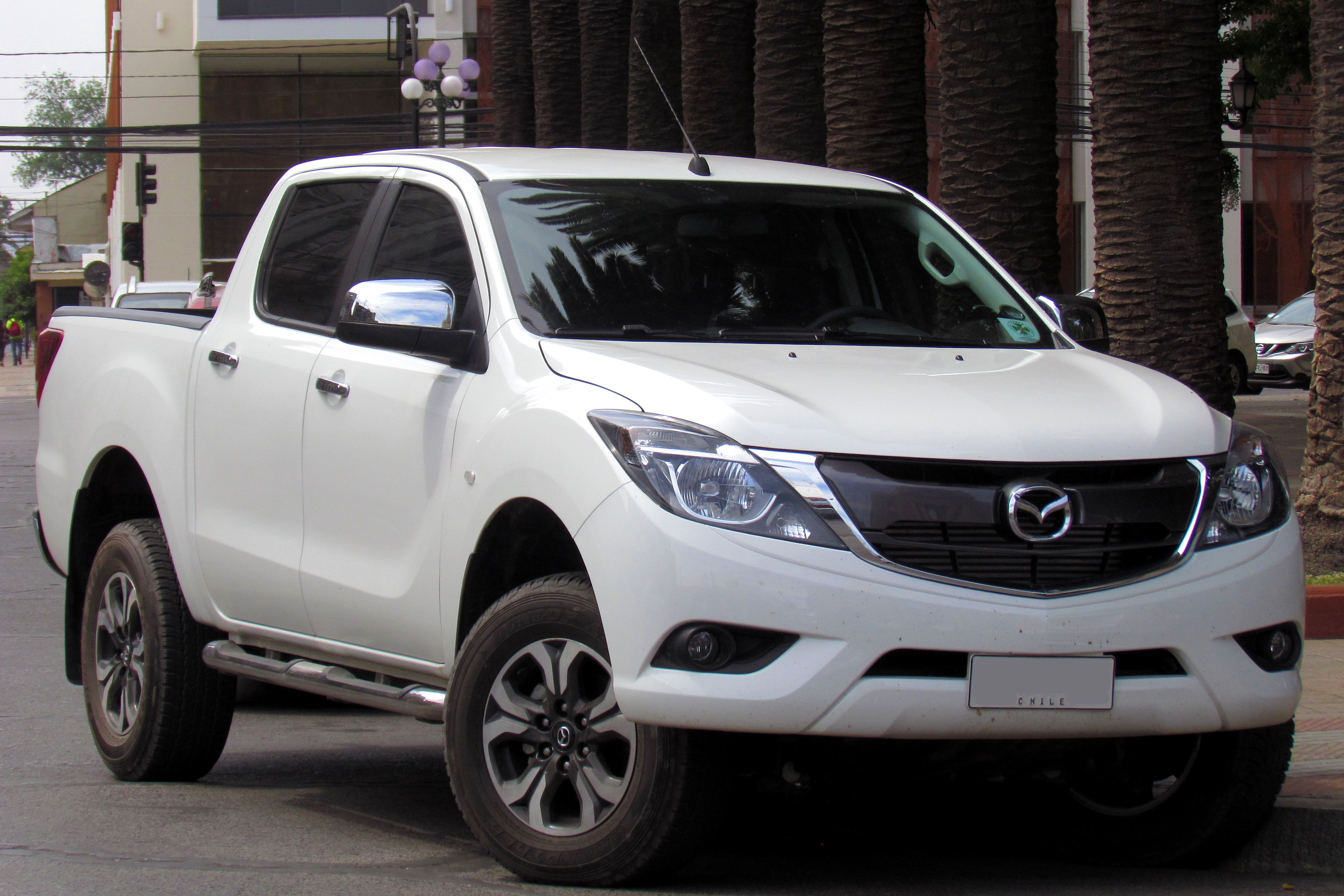 Mazda BT-50 SDX Hi Rider 2016